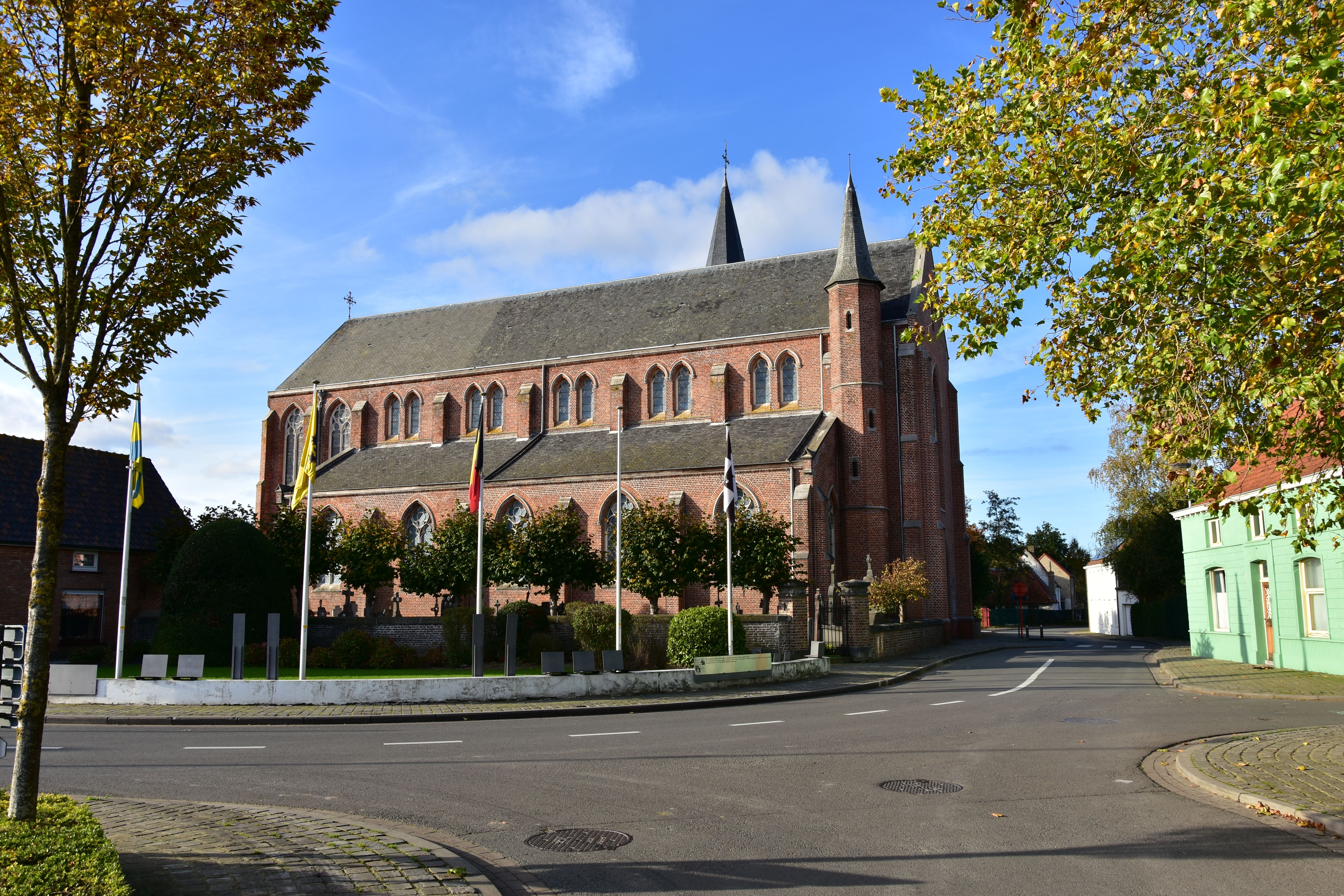 Sint-Eligiuskerk (Snellegem) 88778 - 27-10-2019 16-19-50 This photo of immovable heritage has been taken in the Flemish Region